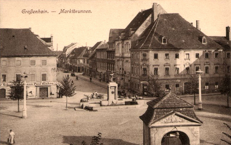 Großenhain in Sachsen (PLZ 01558), Hauptmarkt mit Dianabrunnen - Blick zum Frauenmarkt Scan einer Postkarte vom Verlag Brück & Sohn Meißen, Nr. 20089, Stempel von 1917